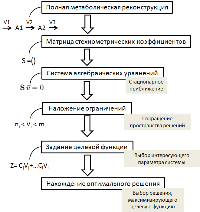 картинка